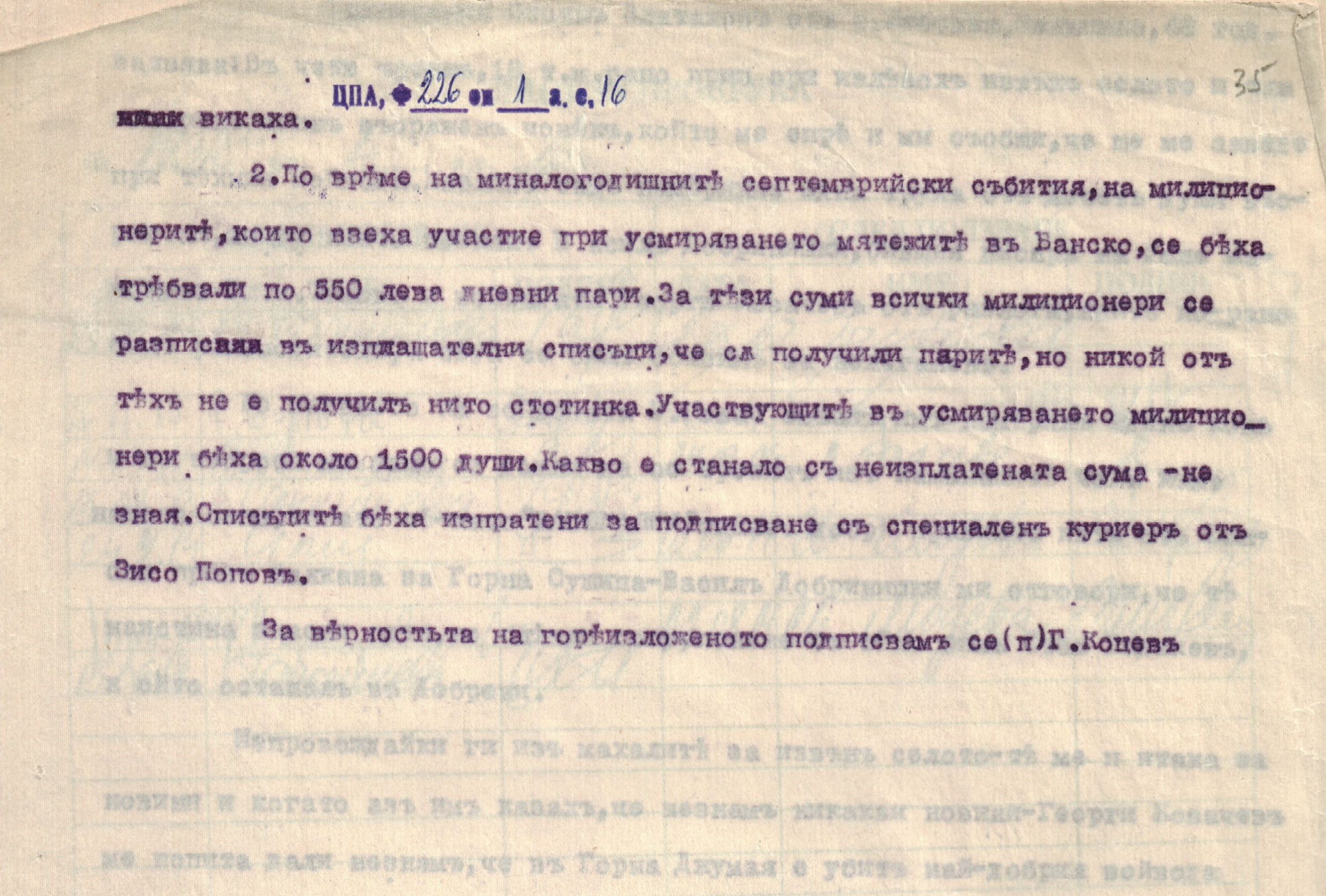 Дознания и изложения на лица от ВМРО по Горнуджумайските събития във връзка с убийството на Тодор Александров.